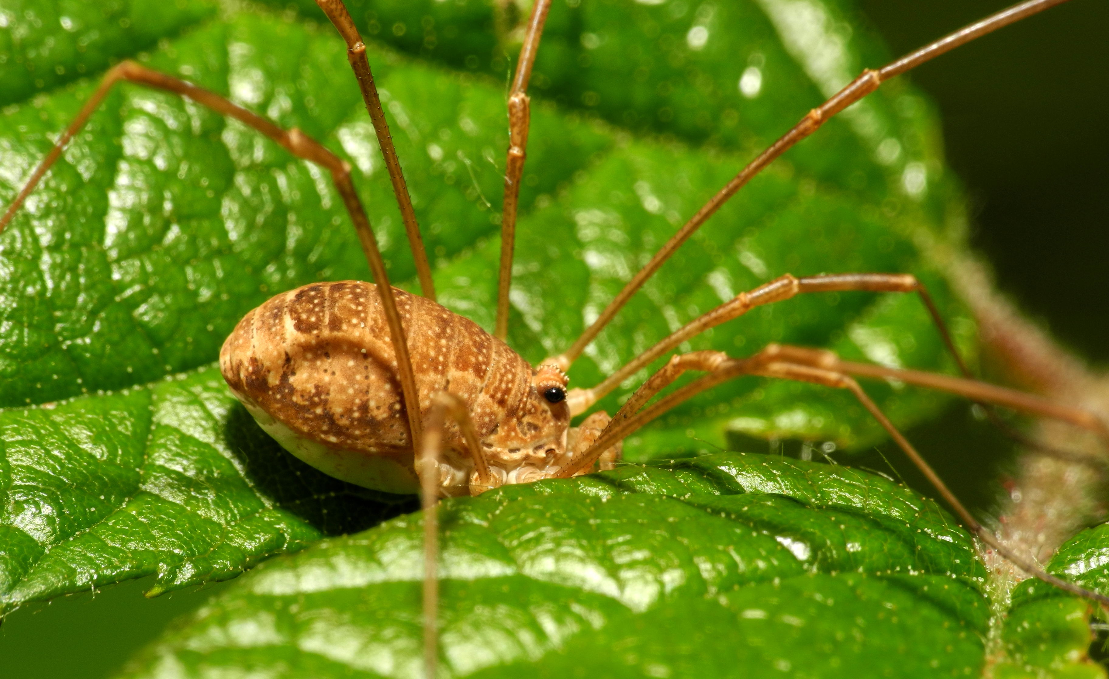 Opilion (Opiliones sp.). Image prise avec la bonnette Raynox DCR-250.